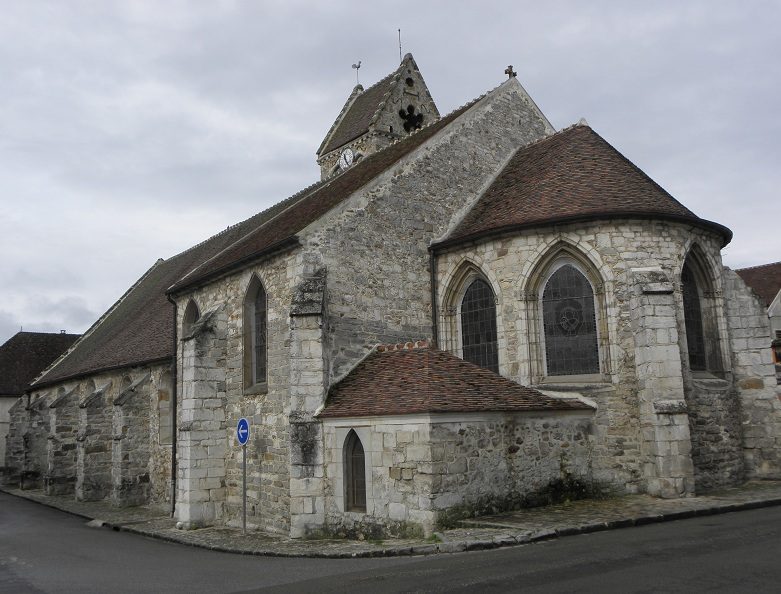 Église Saint-Rémi et Saint-Louis de Villeneuve-sur-Bellot (Seine et Marne, région Île-de-France).